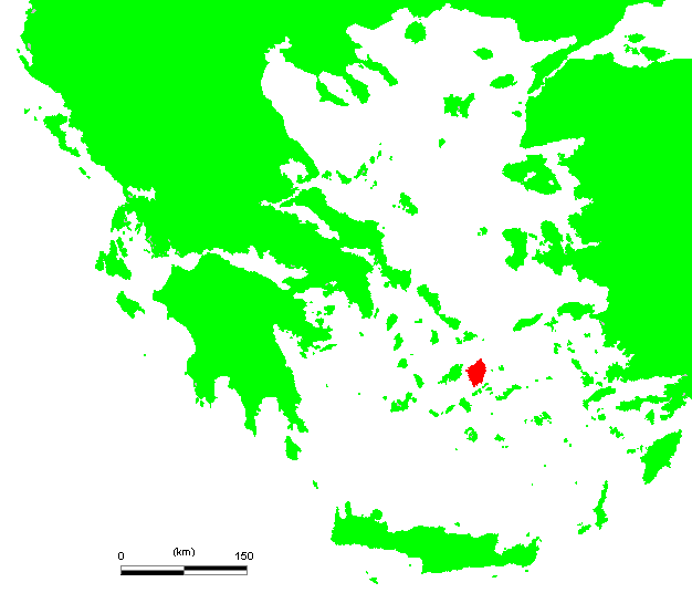 GR Naxos.PNG (Greek island)